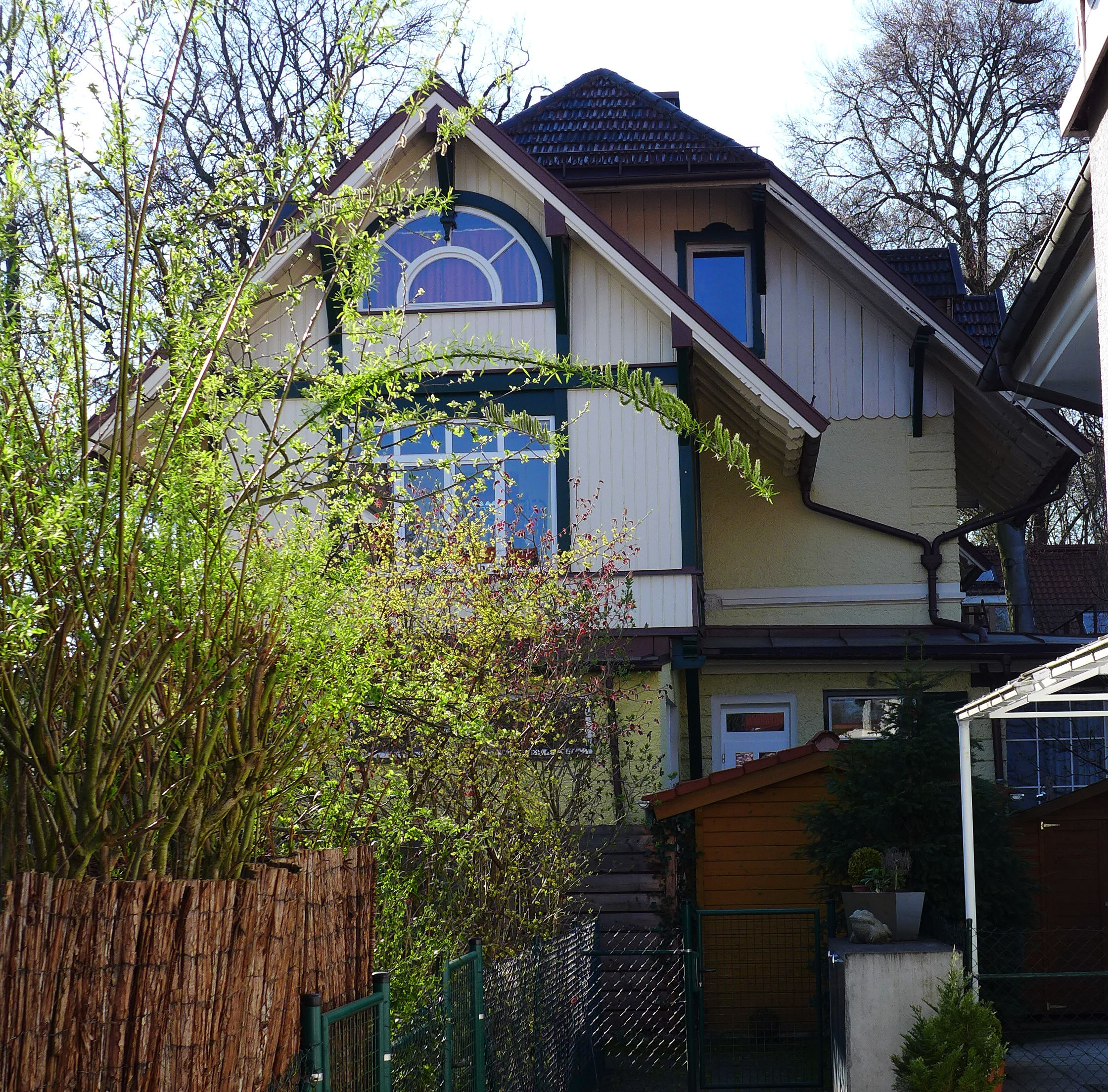 AmStadtpark 43, München